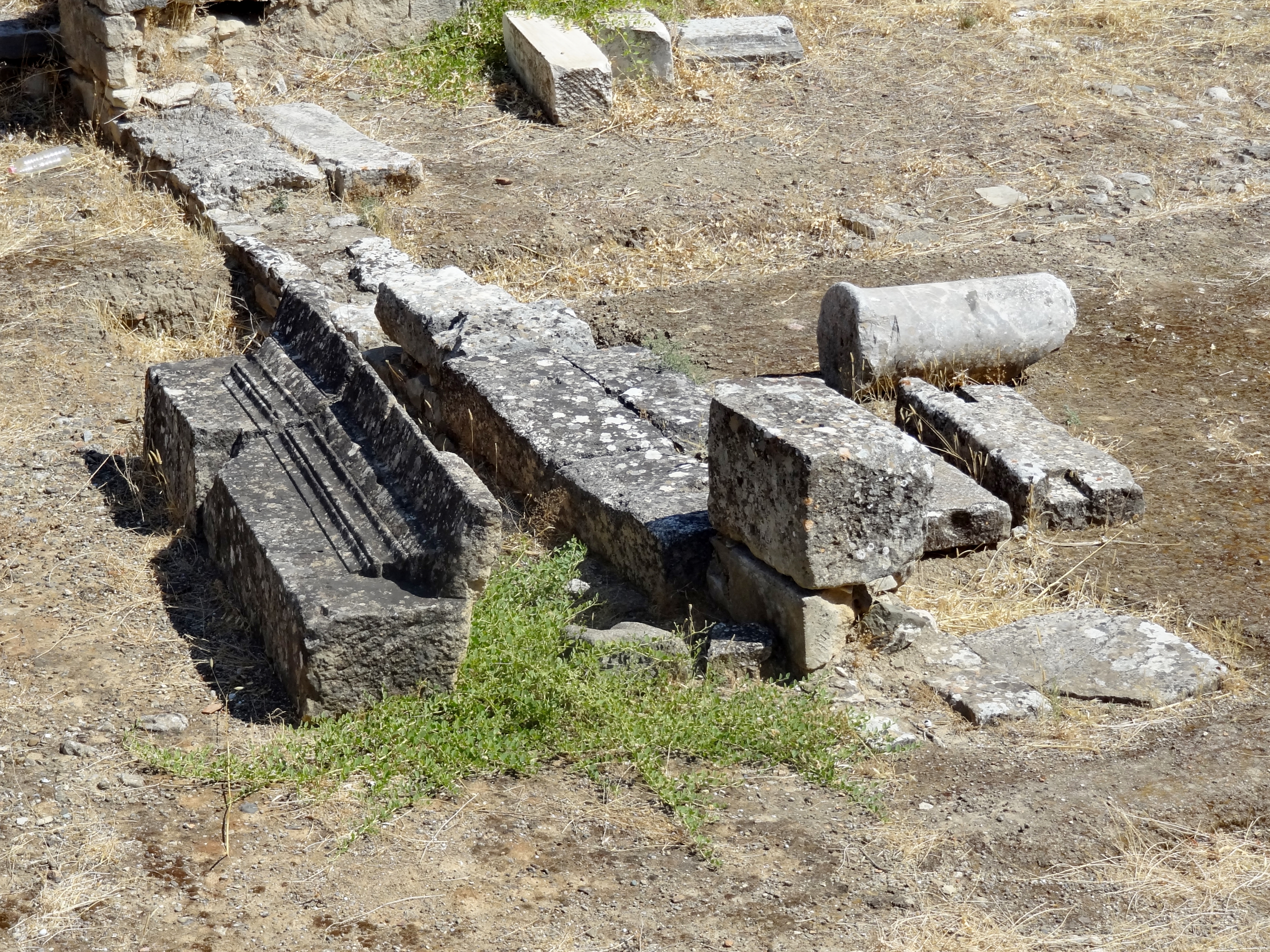 Reste der griechisch-römischen Stadt Gortyn (Γορτύν), Gemeinde Gortyna, Regionalbezirk Iraklio, Kreta, Griechenland